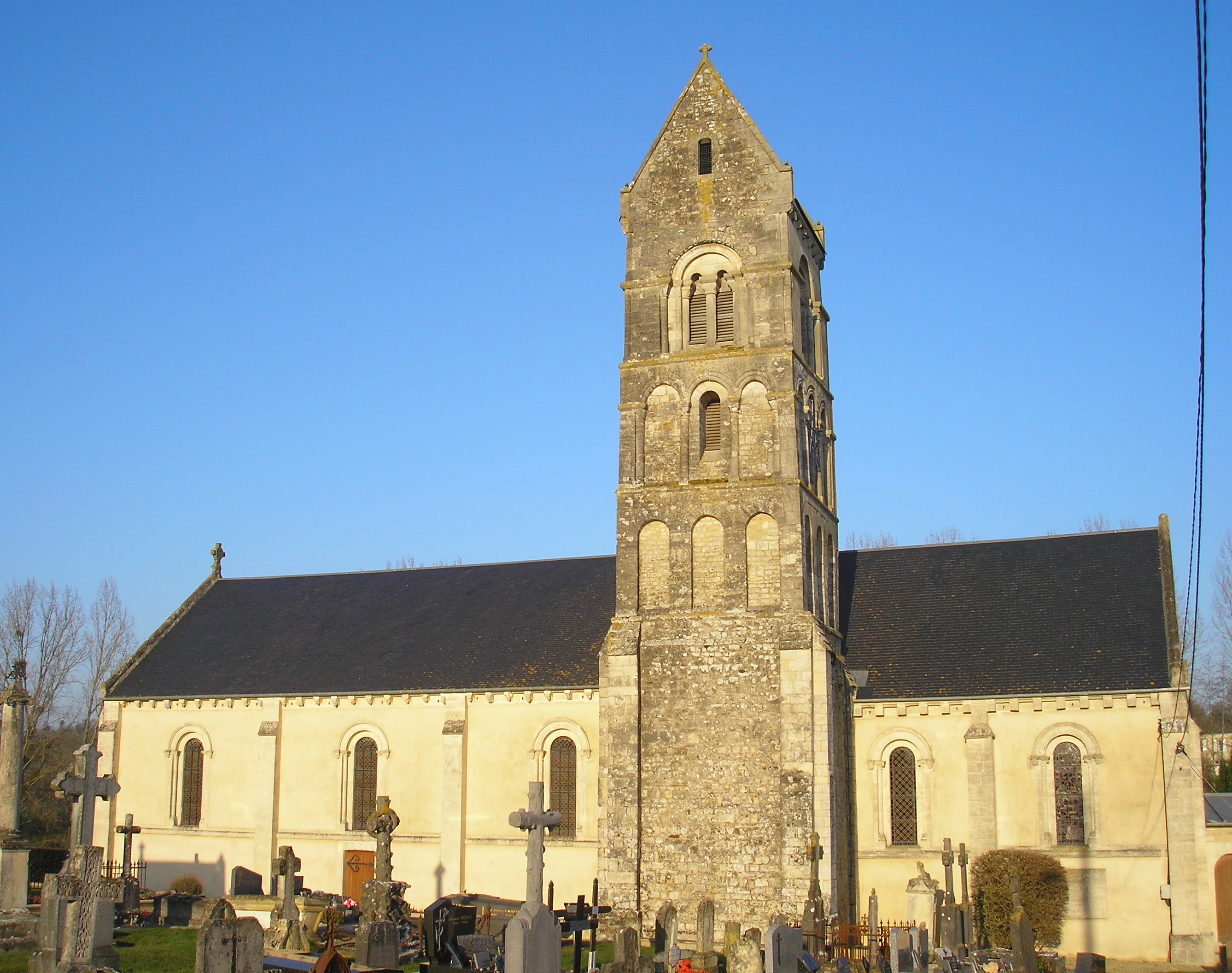 Longraye (Normandie, France). L'église Saint-Pierre.